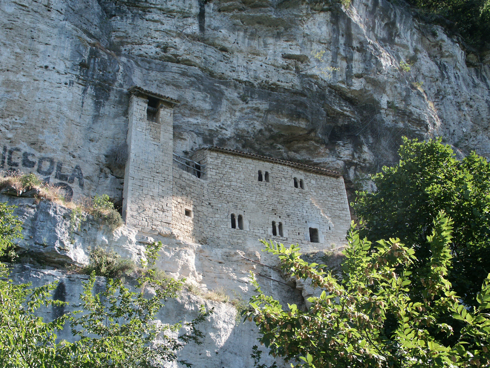 Facciata esterna dell'Eremo di San Marco. Autore: Maurizio Antonelli